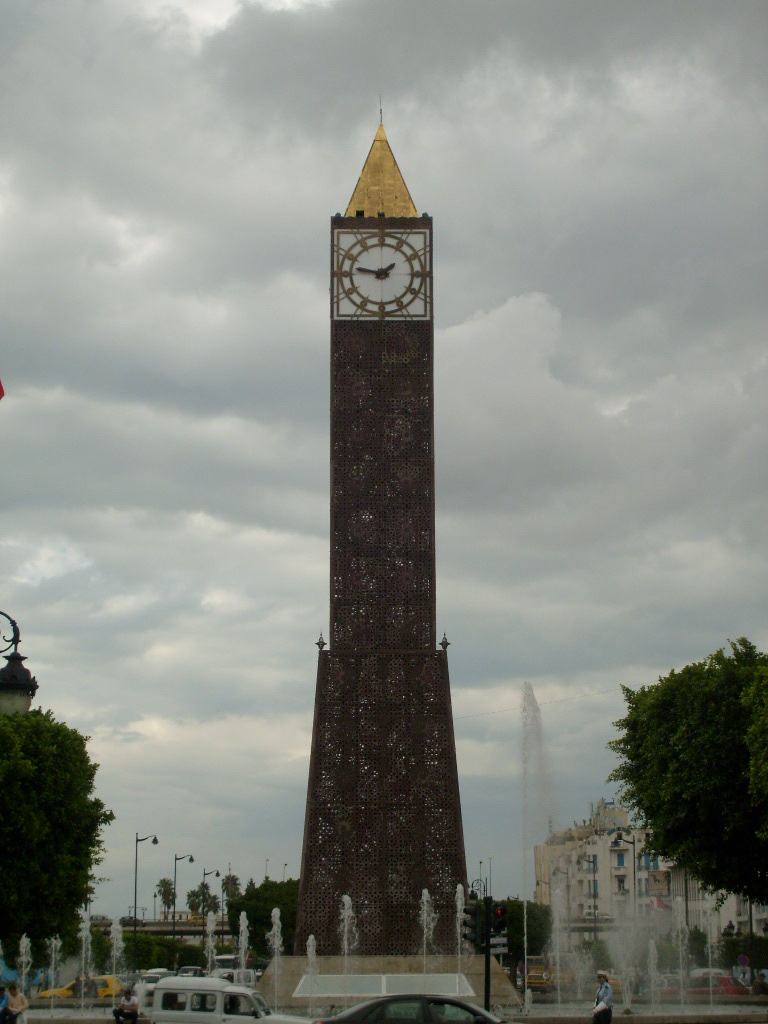 Obélisque de la place du 14-Janvier, anciennement place du 7-Novembre à Tunis